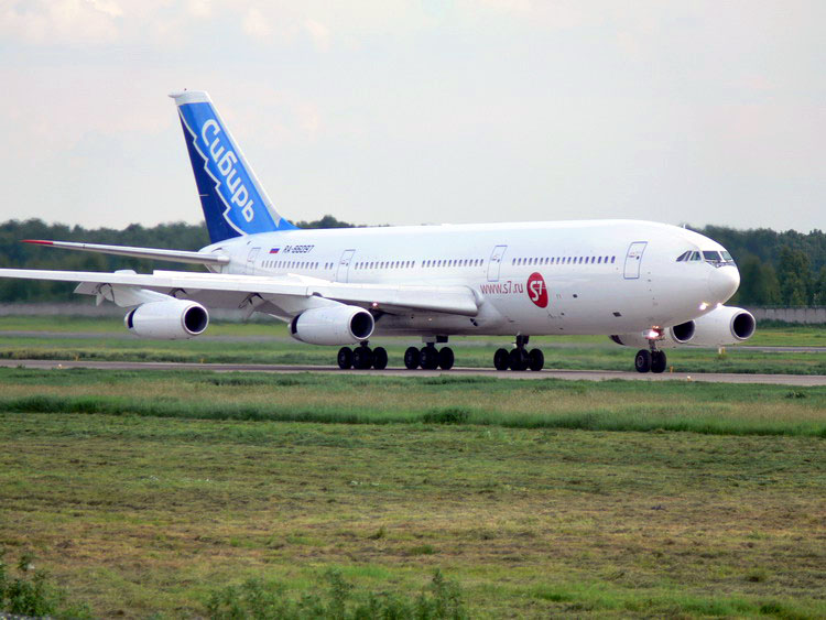 Лицензия